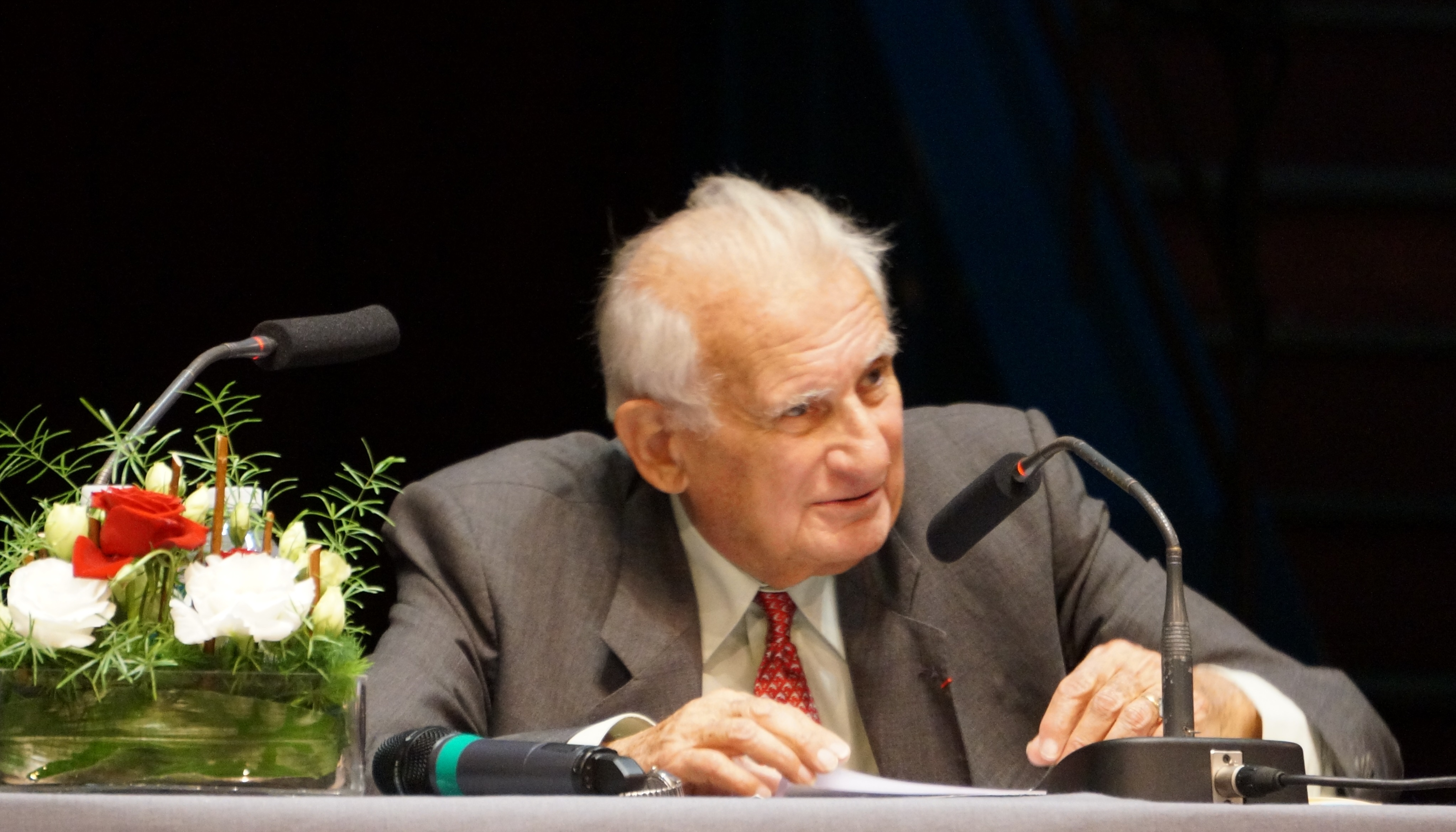 lors du lancement de reims 100 ans au coeur de l'Histoire 14 18.